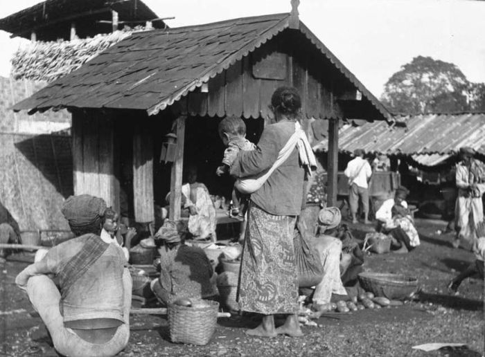 Foto. Markt in het dorp Nongkodjadar, Oost-Java